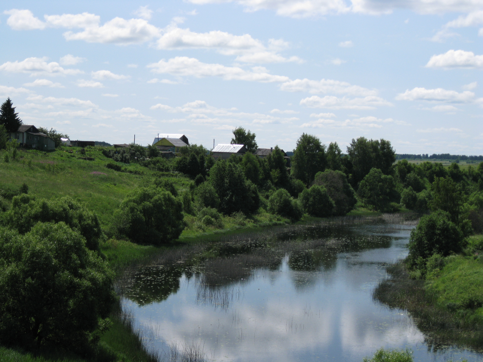 Вид на деревню Безгузово